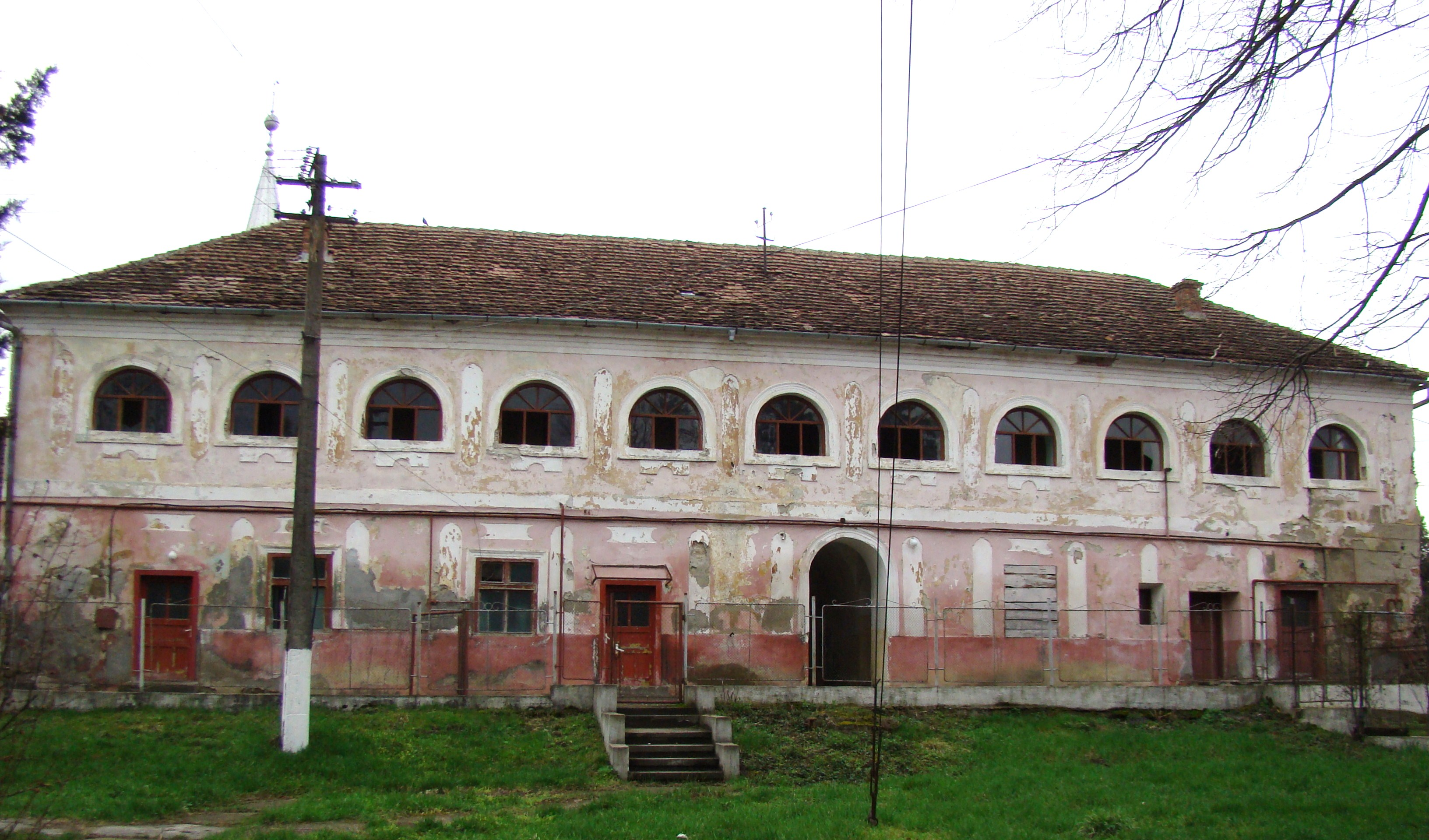 Castelul Rhédei-Rothenthal, Corp B, sat Seuca; comuna Gănești 02